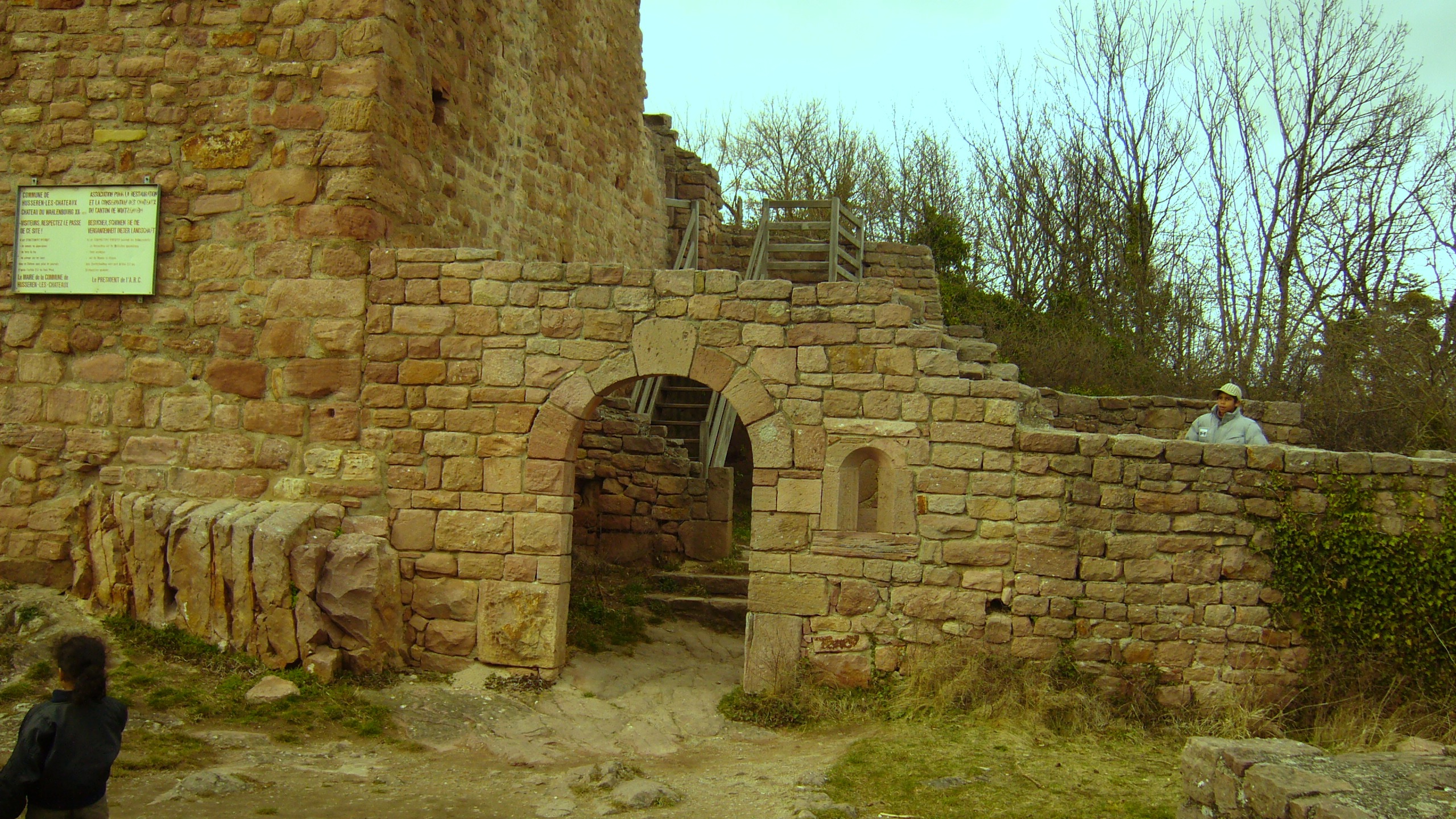 Vestiges du château d'Eguisheim - Porte d'entrée du Wahlenbourg